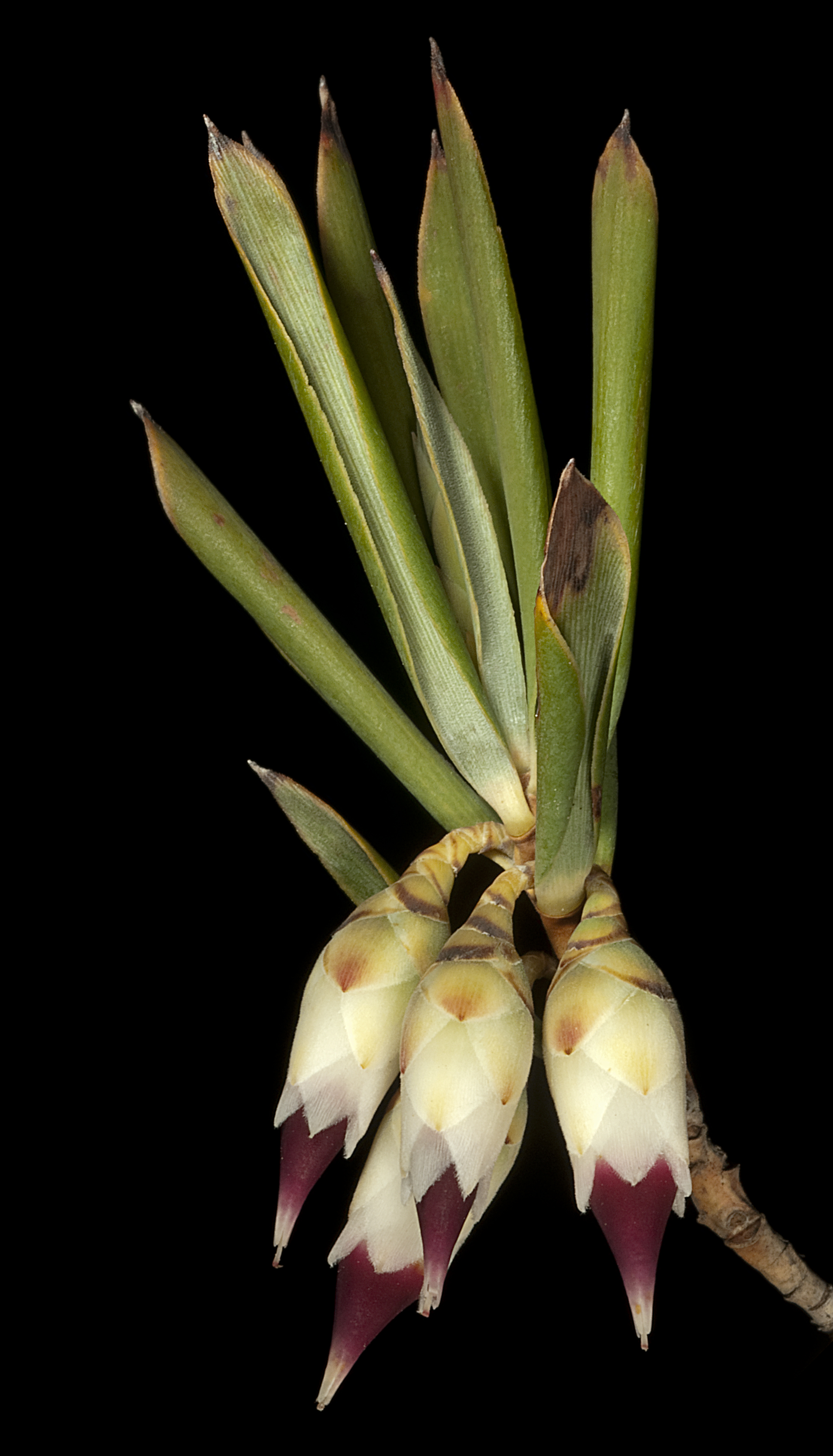 KRT3994